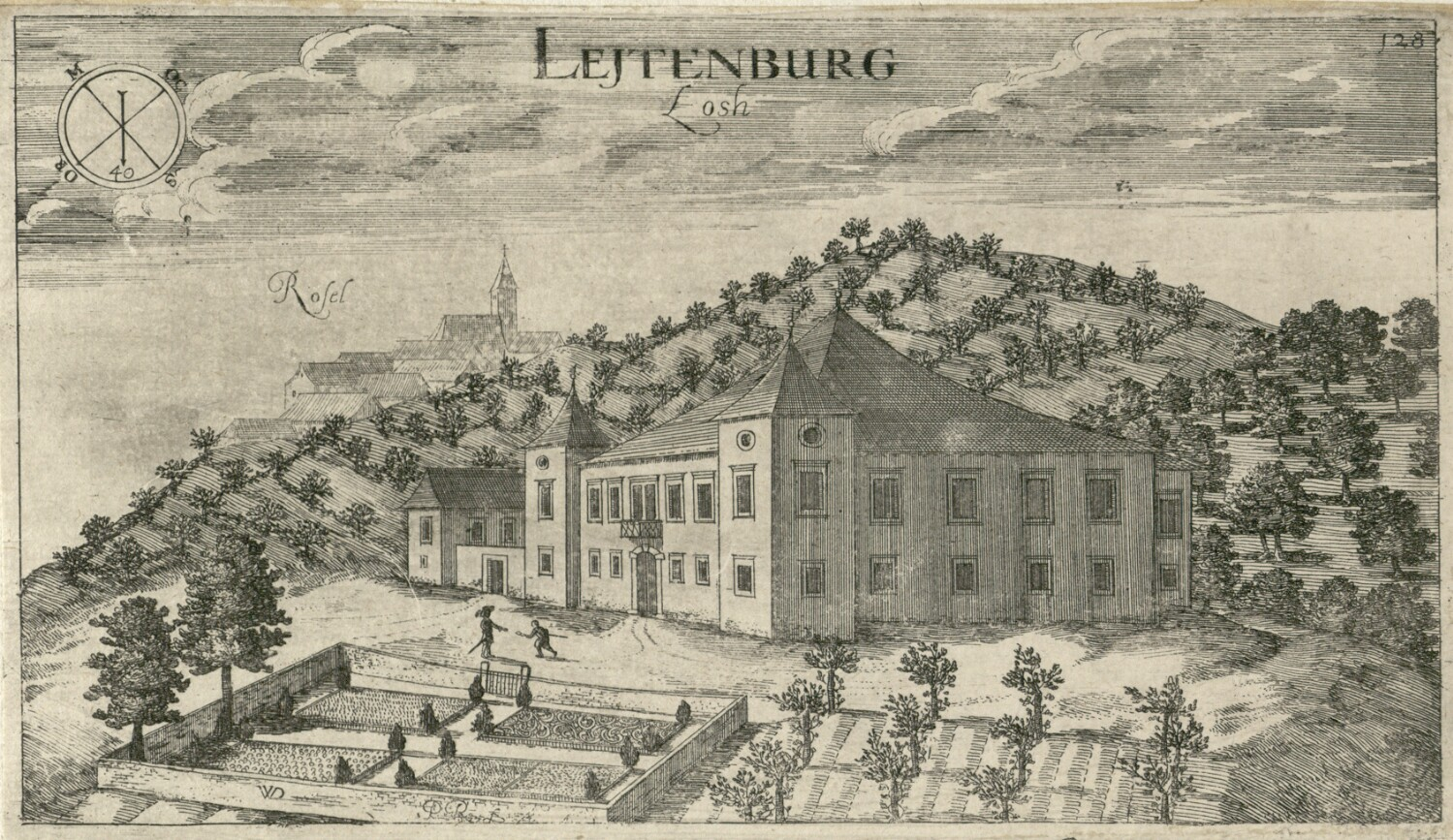 Grad Lože